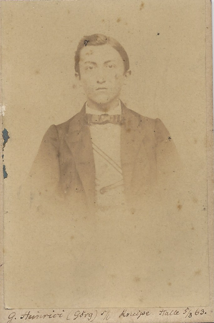 Gerog Heinrici als Hallenser Neupreuße